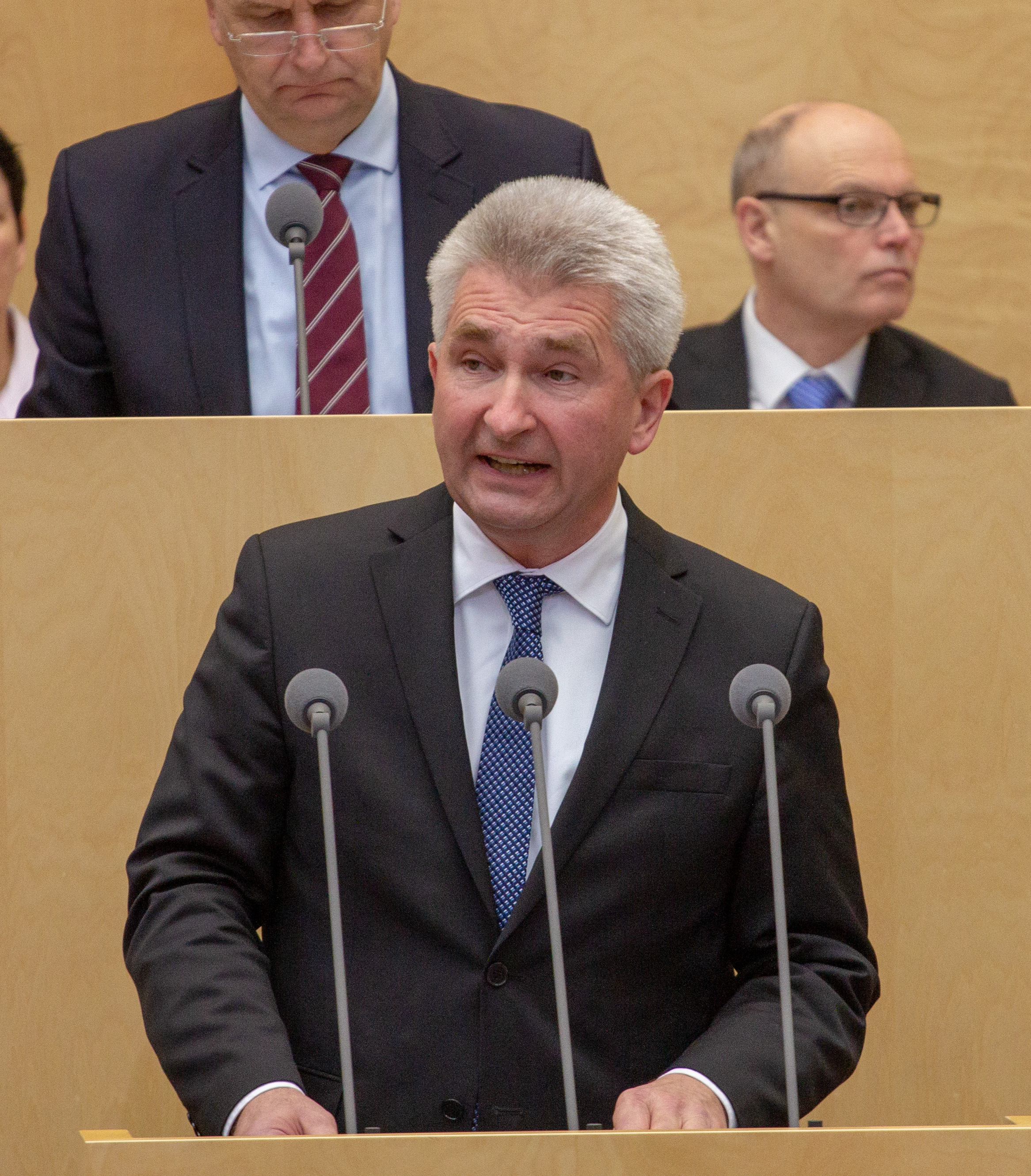 Plenarsitzung des Bundesrates am 12. April 2019 in Berlin.